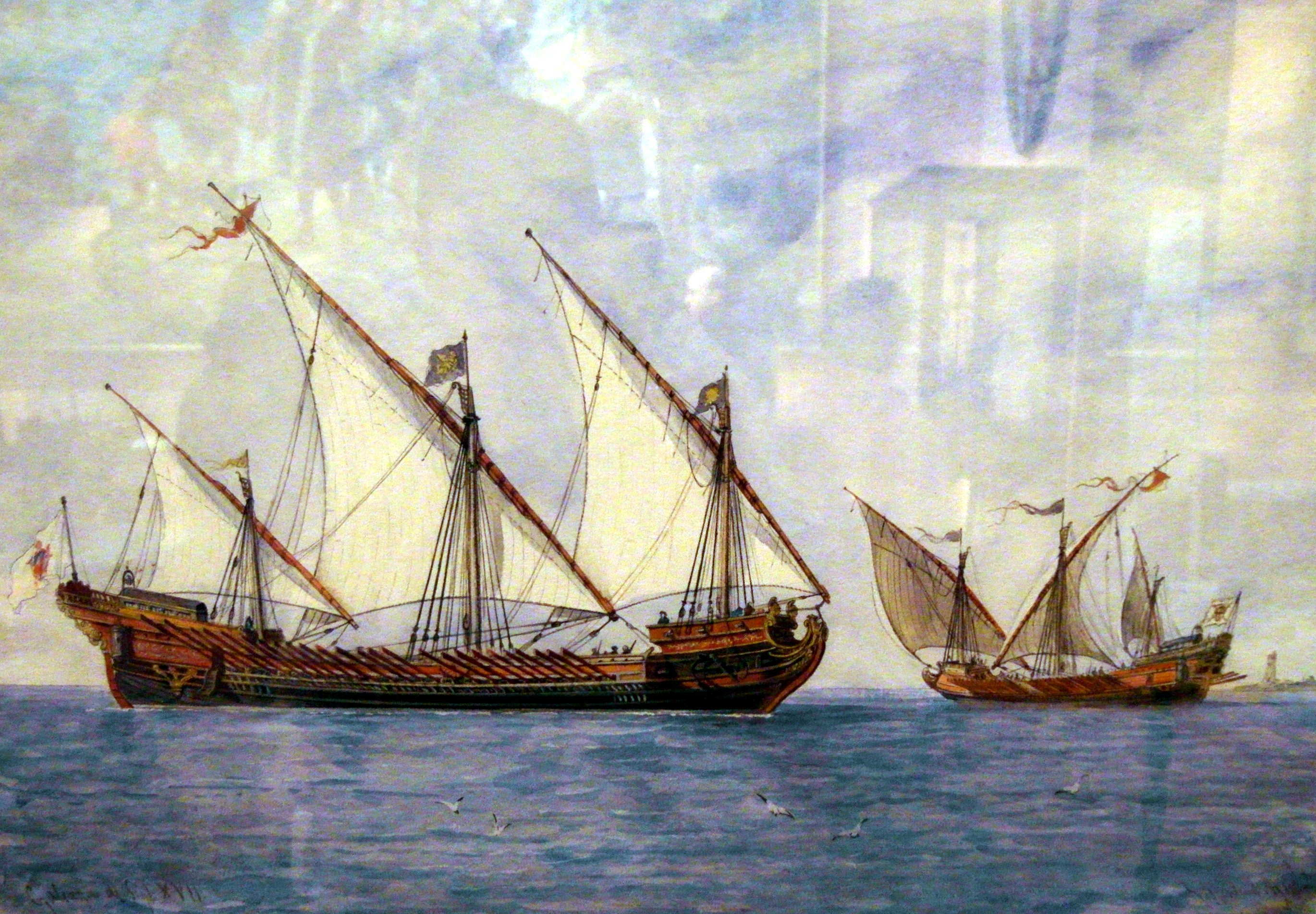 Ilustración de una galeaza veneciana de principios del siglo XVI conservada en el Museo Naval de Madrid, (España).